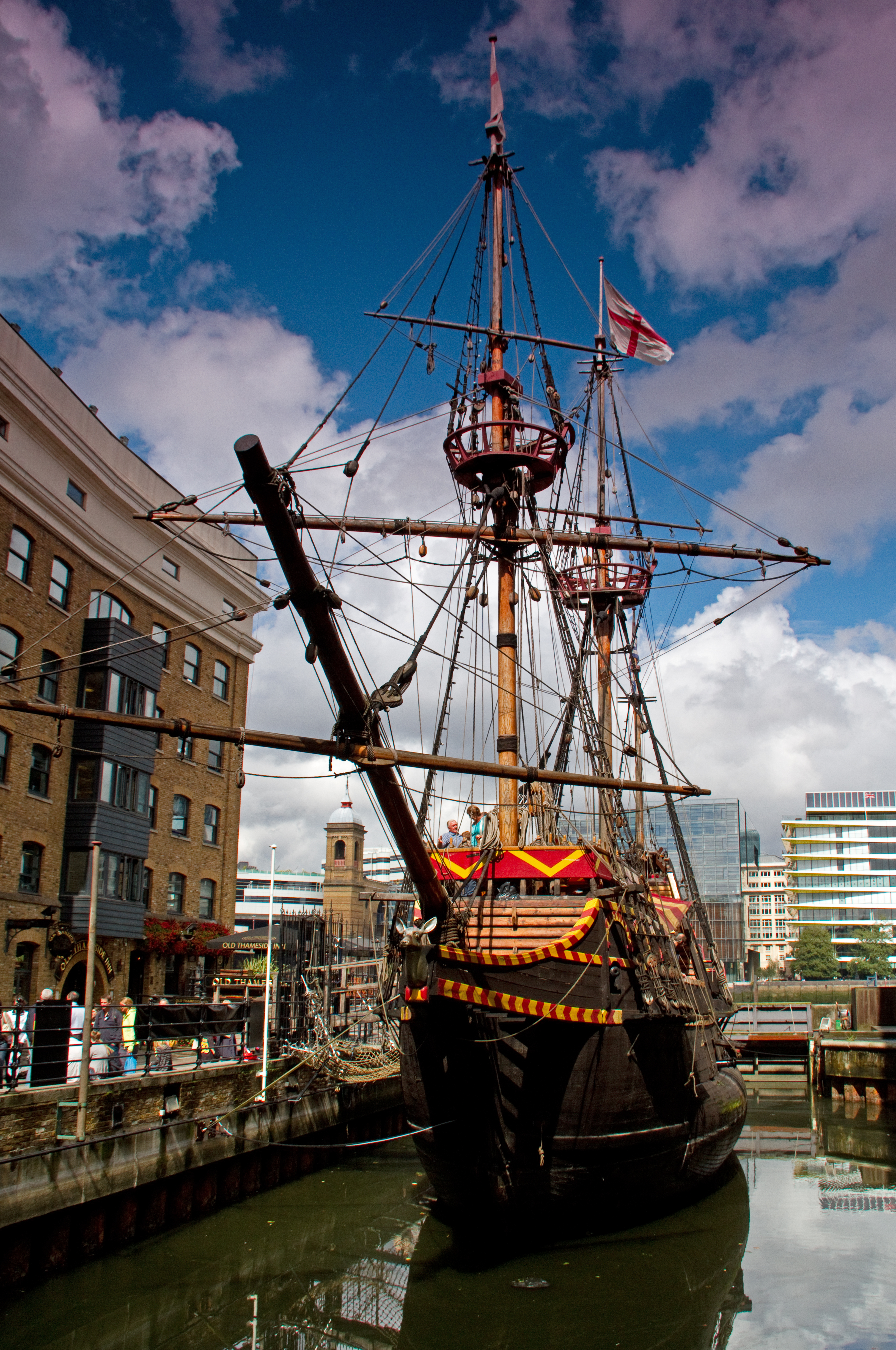 Golden Hind